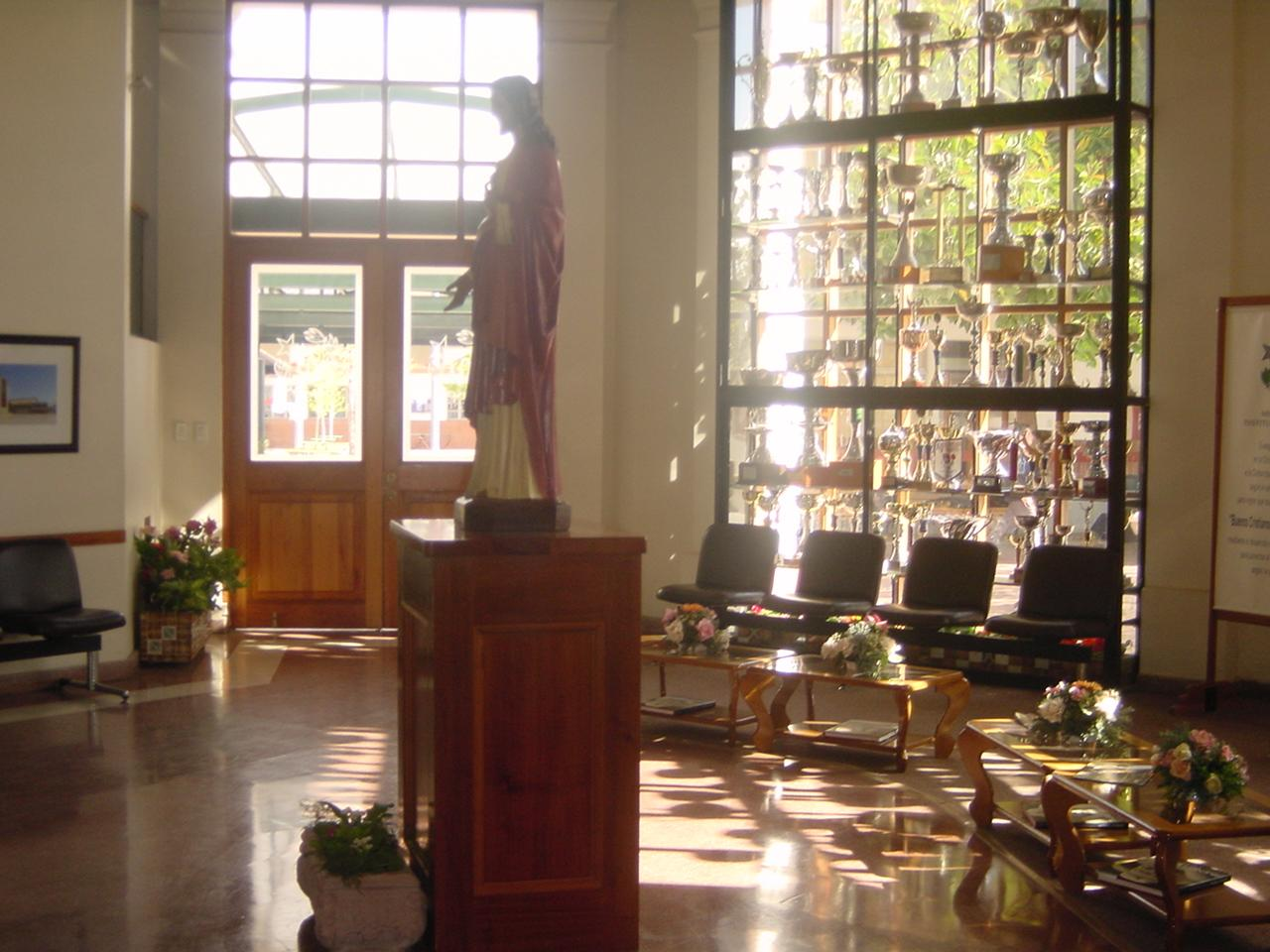 Hall de entrada al Instituto O'Higgins, Rancagua